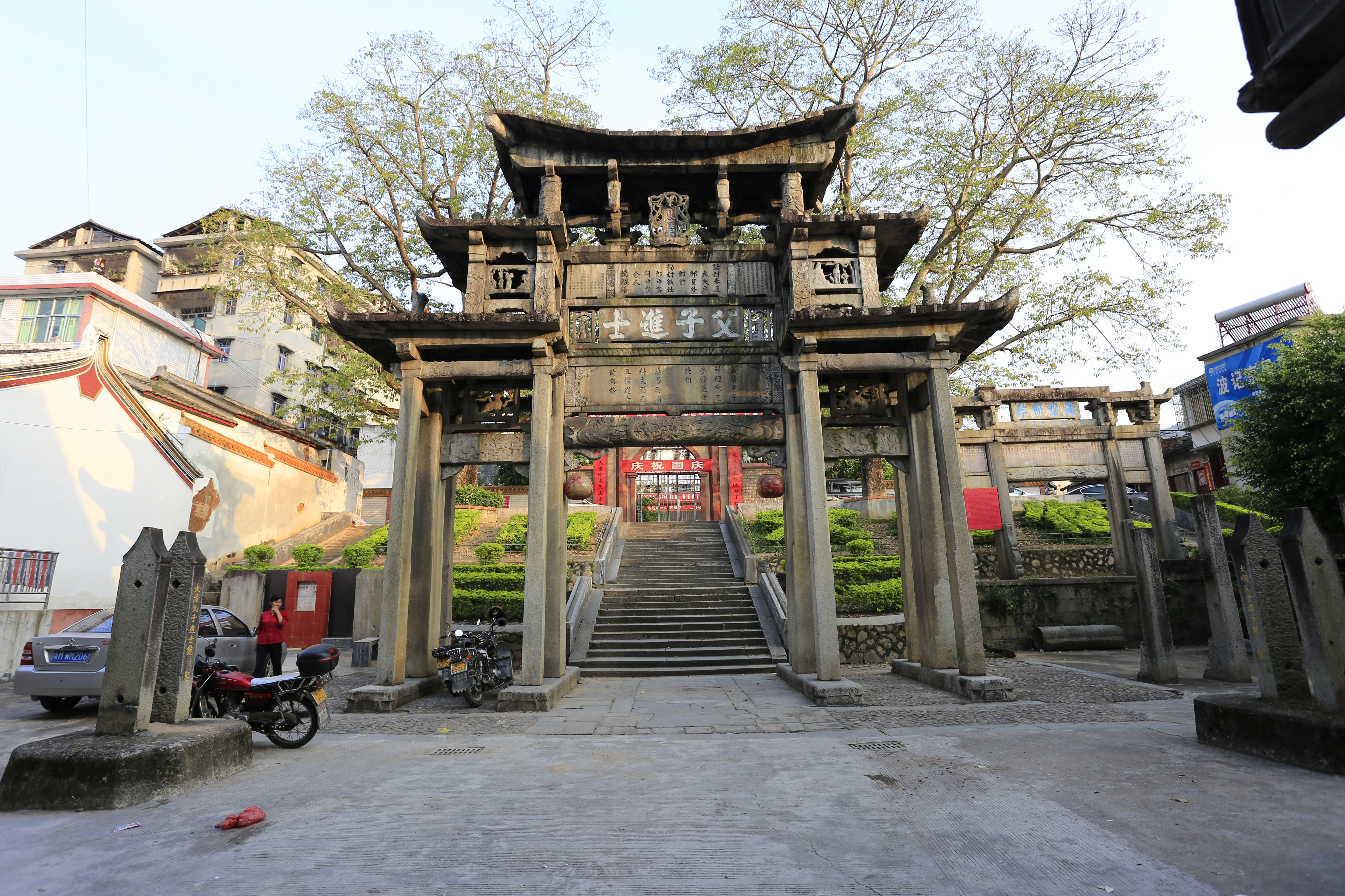 广东省大埔县茶阳镇“父子进士”牌坊—— 南面